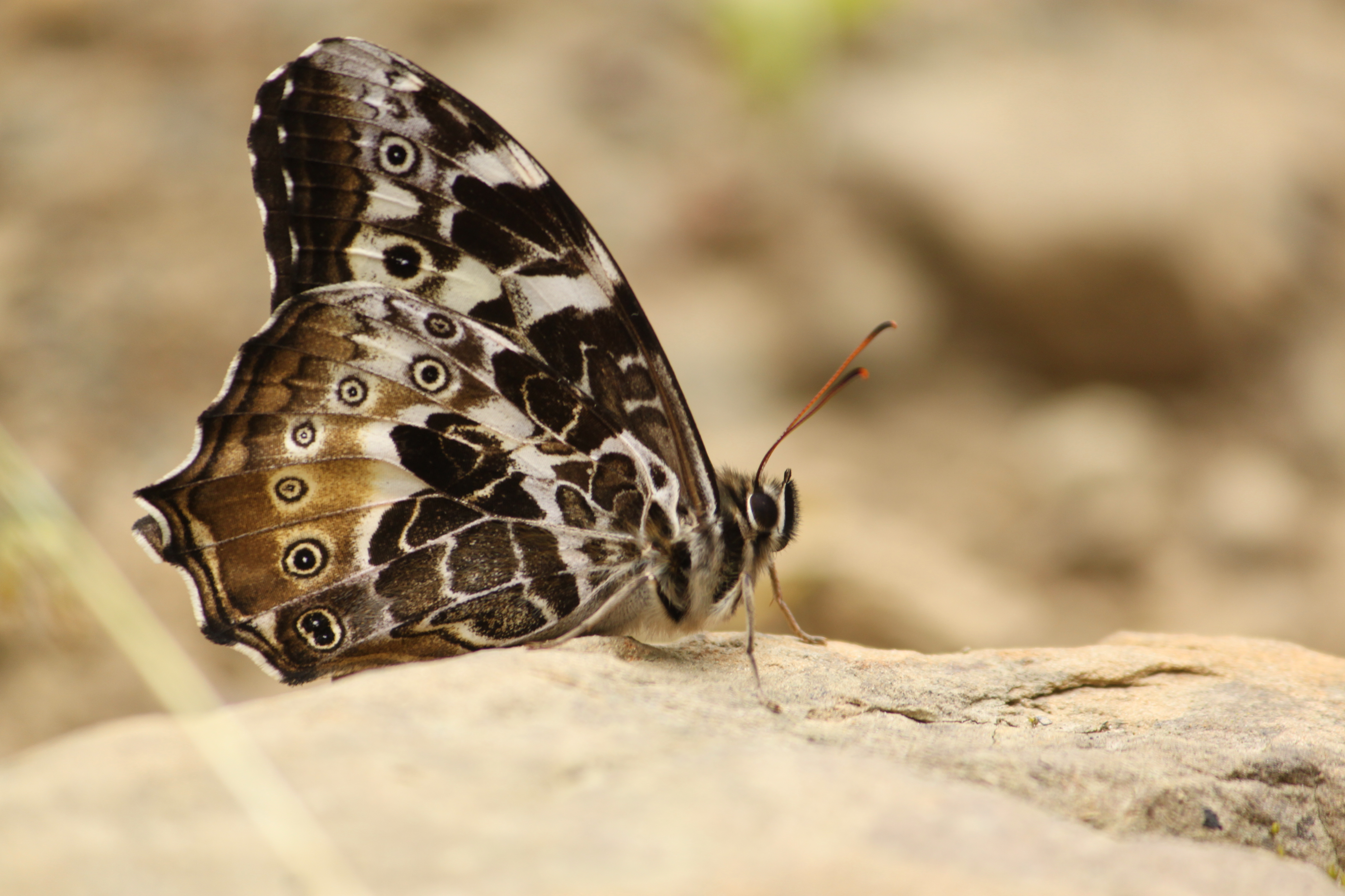 405白色黃斑蔭蝶2(陳麗玲攝)